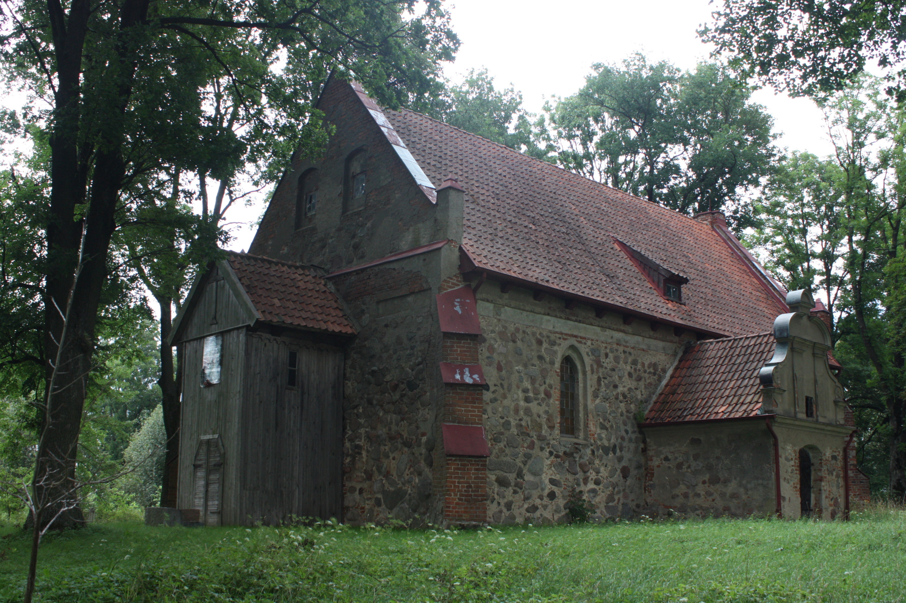 Gudniki - kościół filialny pw. św. Andrzeja Boboli (A-83 i 36 (G/3) z 28.06.1950) This photo of Warmian-Masurian Voivodeship was taken during Wikiexpedition 2012 set up by Wikimedia Polska Association. You can see all photographs in category Wikiekspedycja 2012. The making of this document was supported by Wikimedia Polska.